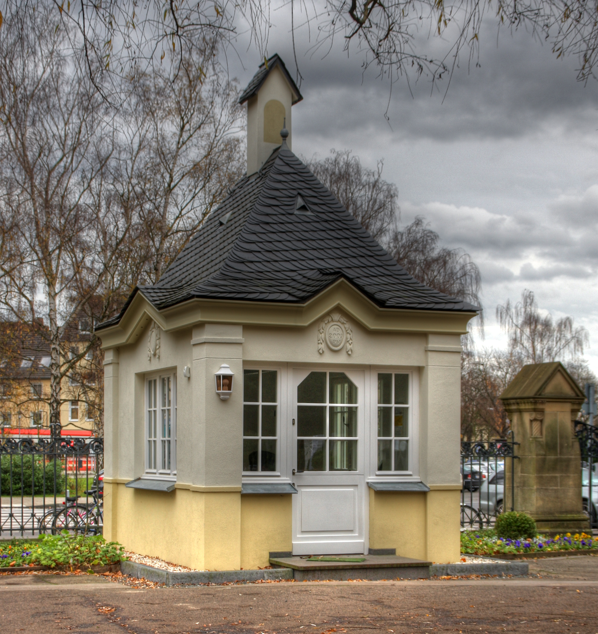 Wiedererrichtetes Pförtnerhaus am Eingang des Südfriedhofs in Köln, Fertigstellung 2009